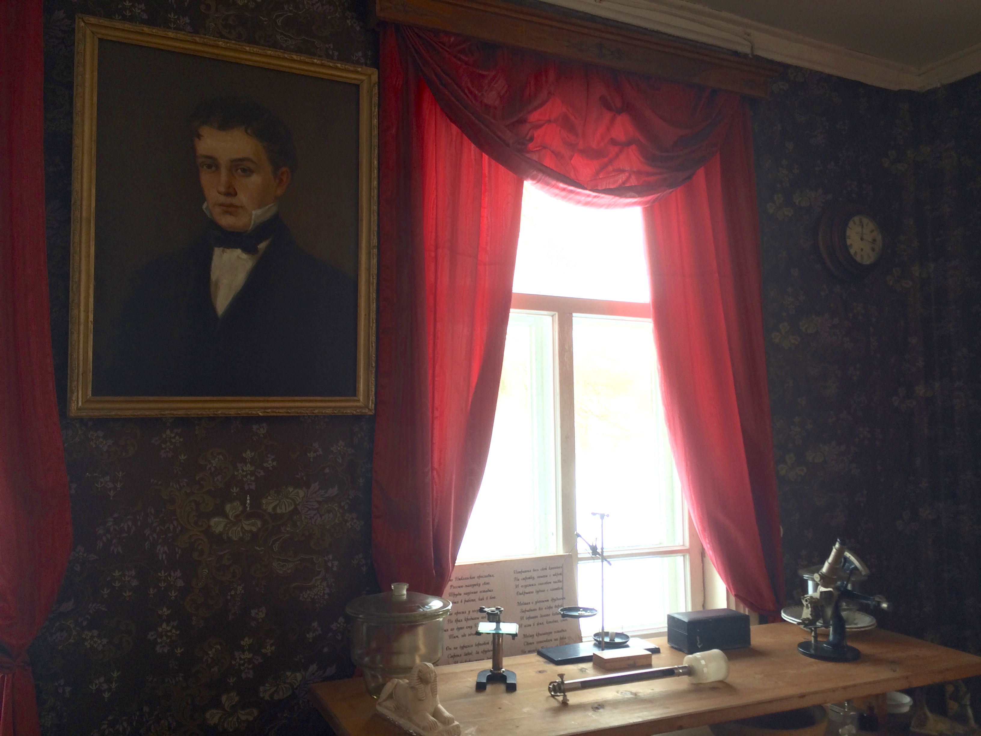 Музей Никольского рыборазводного завода